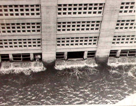 Creciente del 59 en Rincón del Bonete 1959 Flujo de agua por Ventanales de Sala de Maquinas